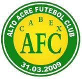 Logo: Alto Acre Futebol Club, Epitaciolândia (Acre), Brazil.